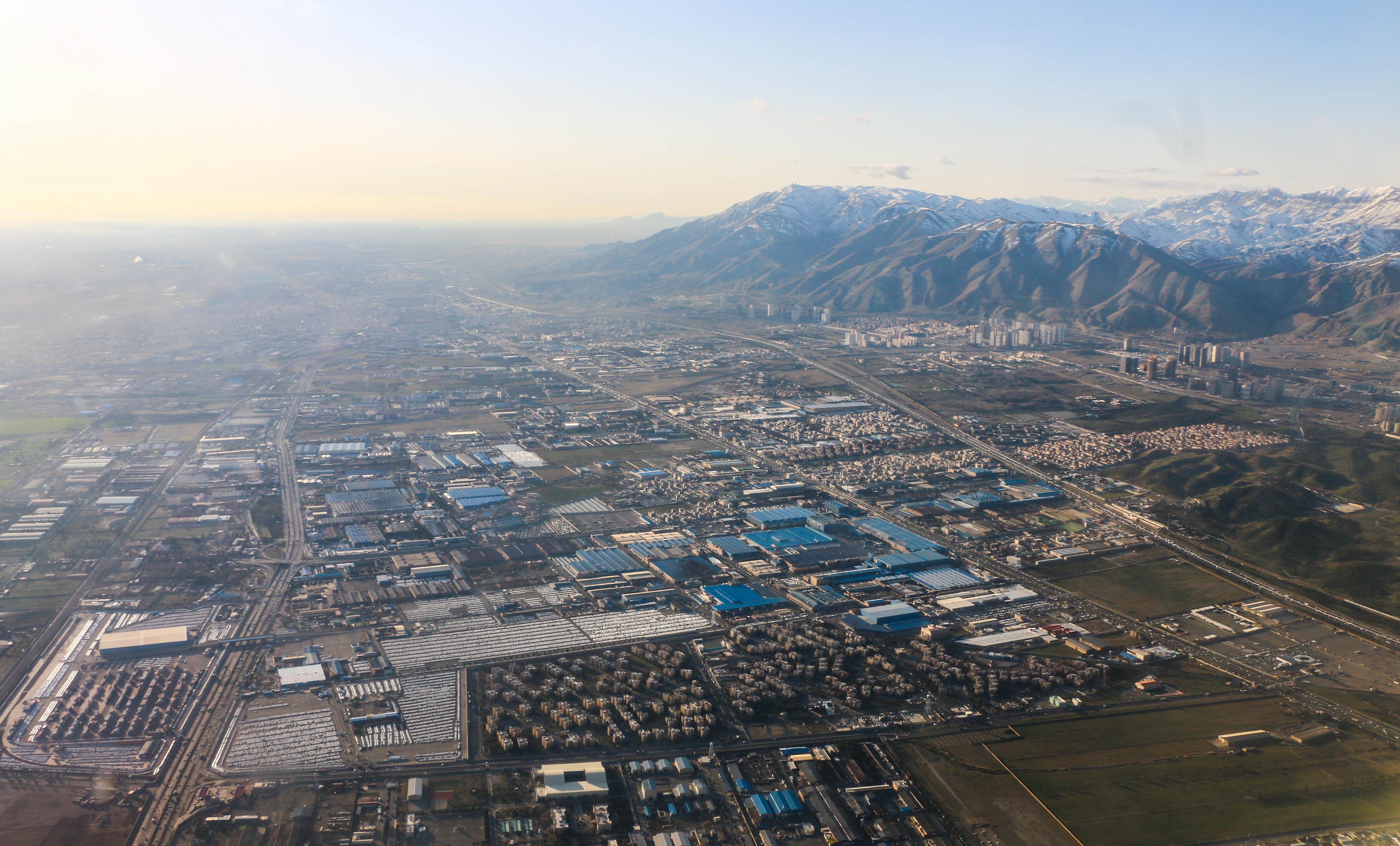 نمایی از شهرک‌های صنعتی بین تهران و کرج - عکس از محمدامین نوبهار